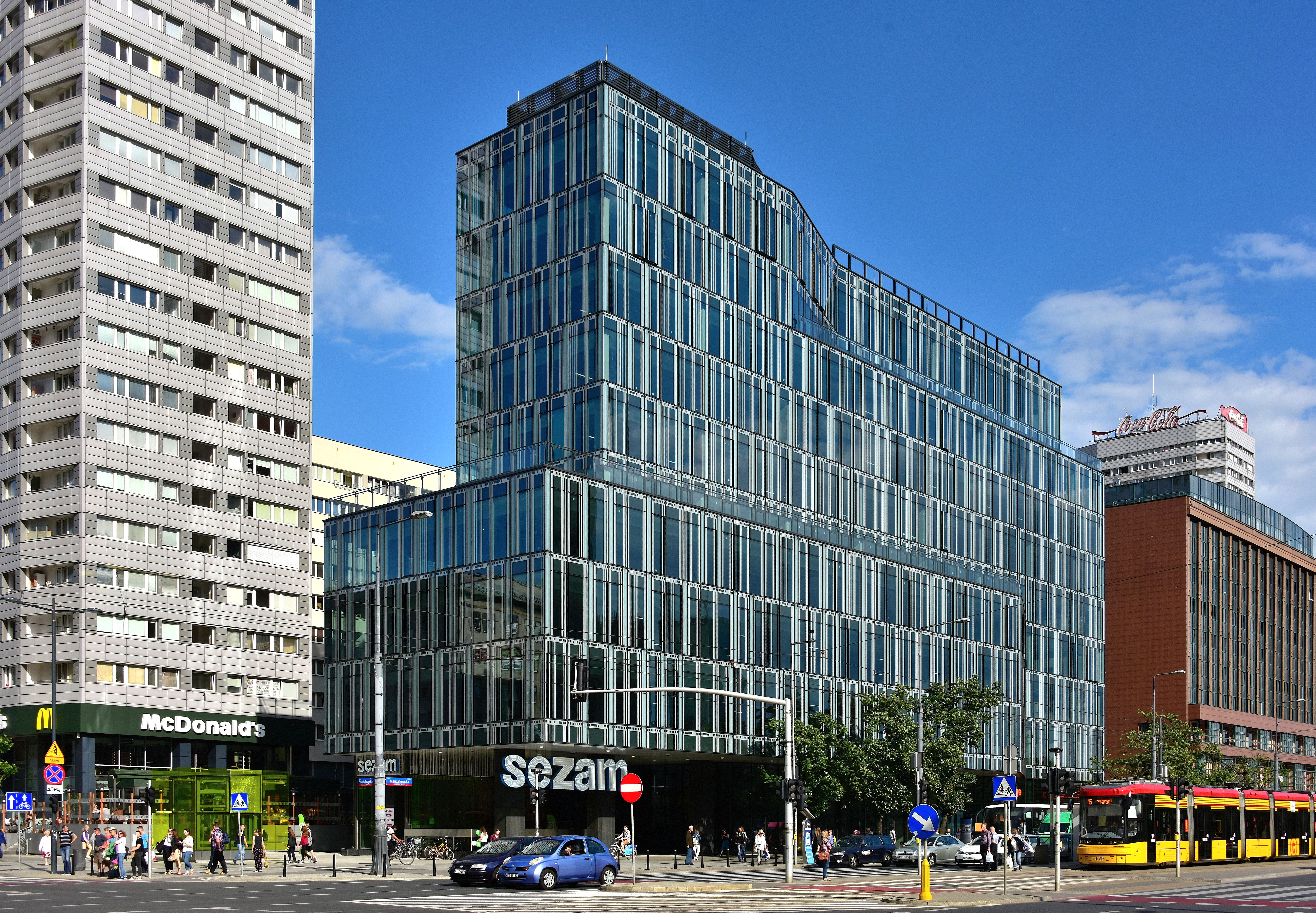 Centrum Marszałkowska w Warszawie, widok od strony ul. Świętokrzyskiej